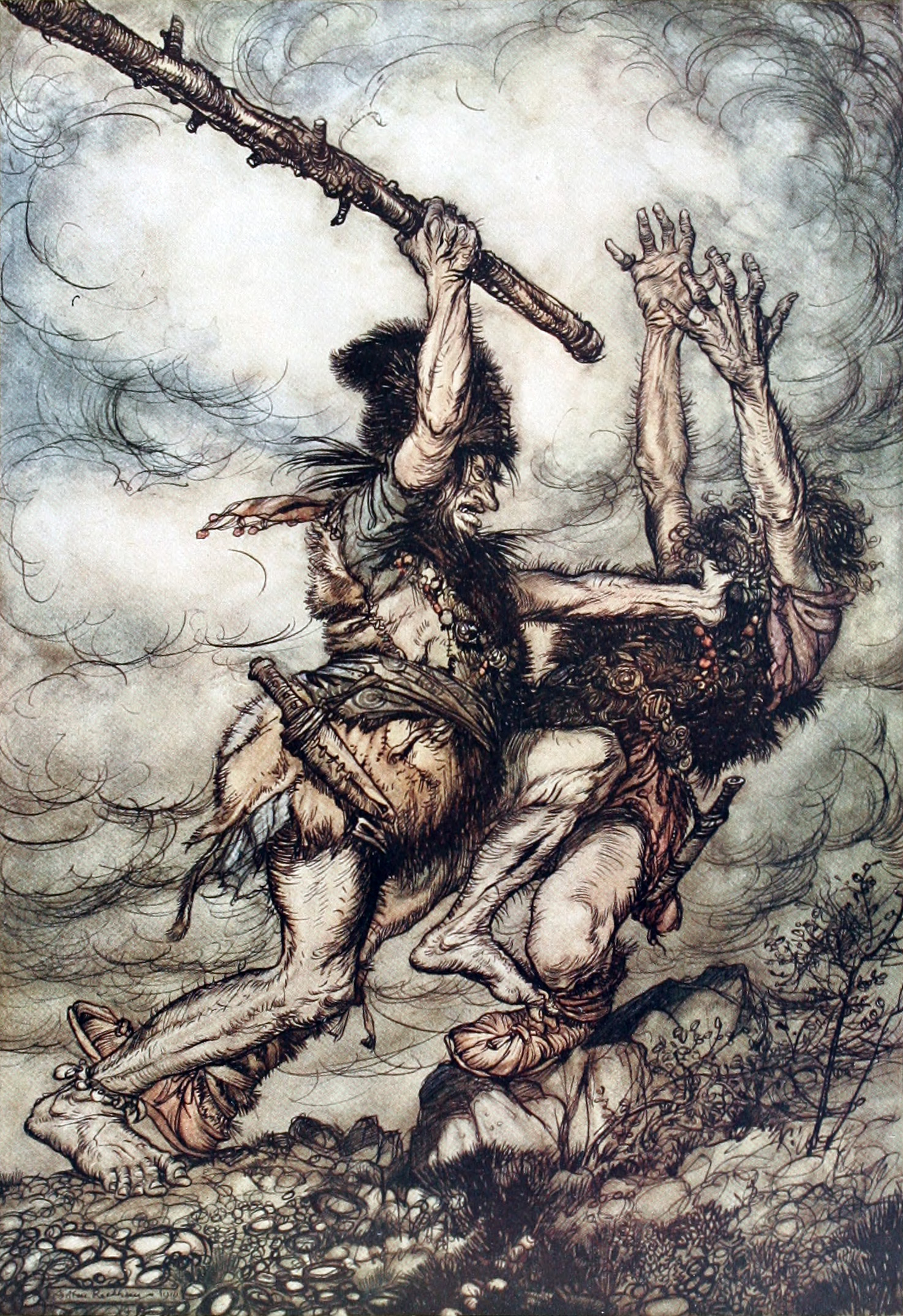 Fafner kills Fasolt.